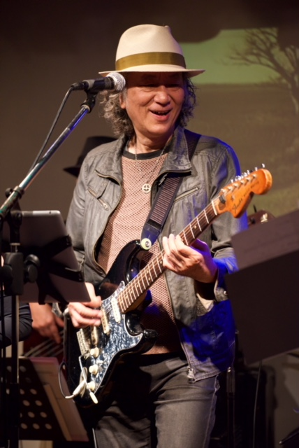 2015年、ライブハウス「学芸大学メイプルハウス」にて